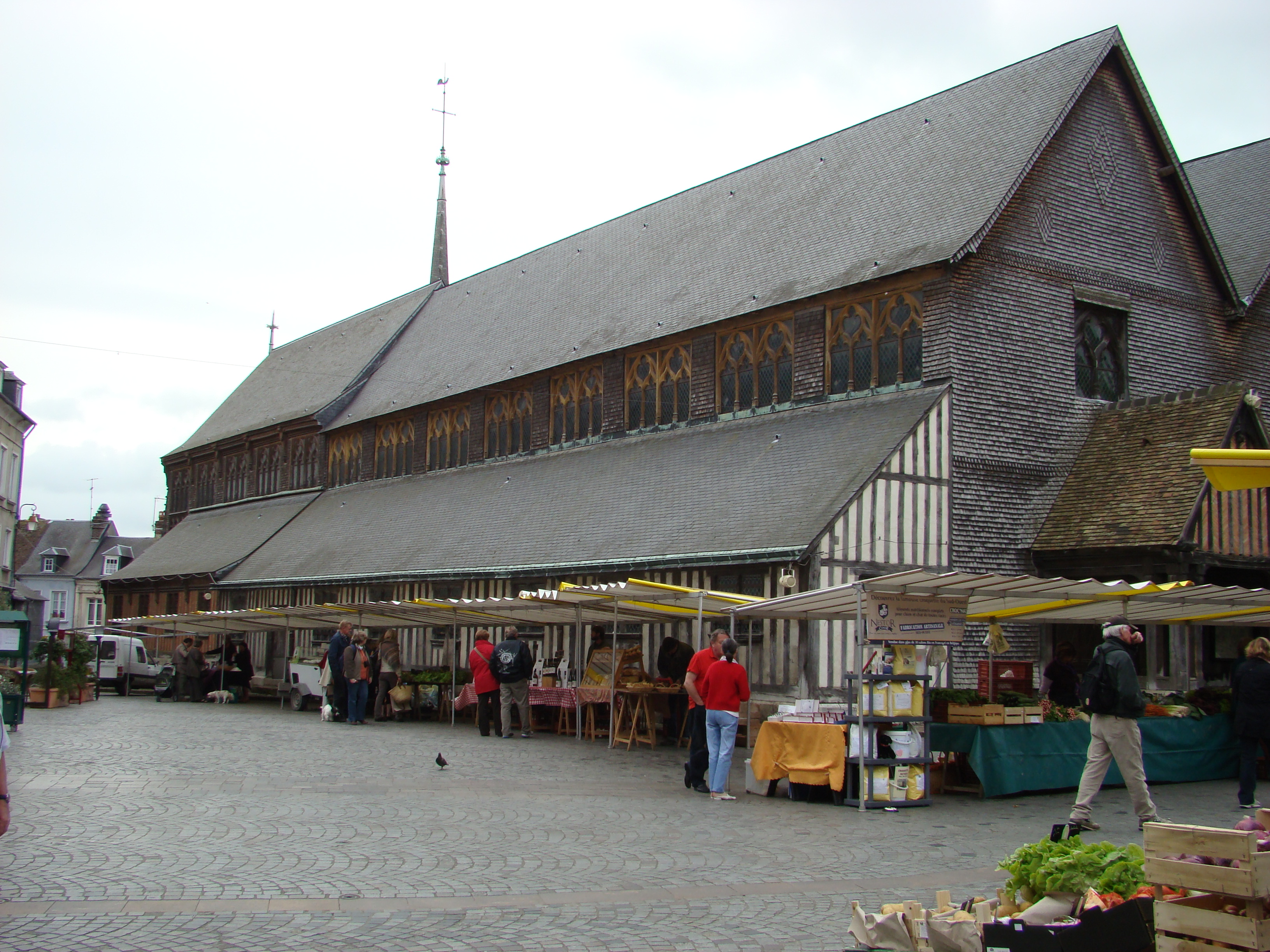 Église Sainte-Catherine d'Honfleur